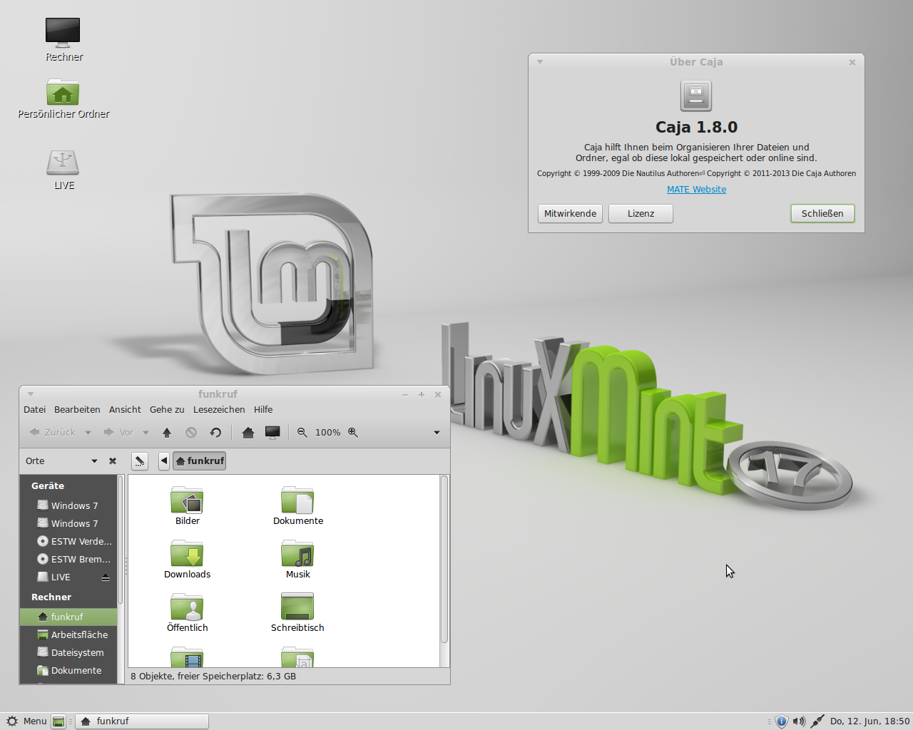 MATE-Desktop von Linux Mint 17